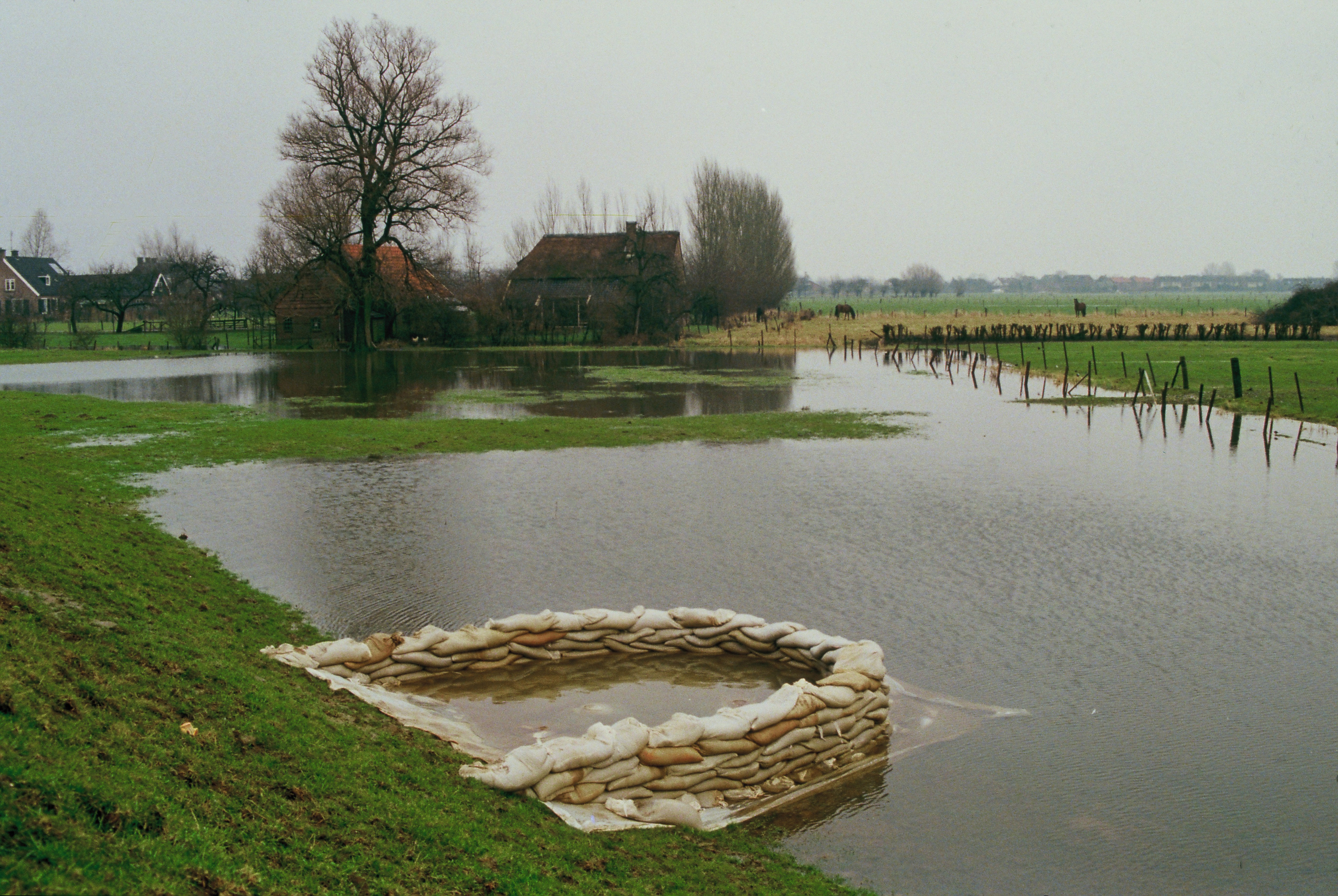 Opgekiste zandmeevoerende wel in 1993 bij Lathum langs de IJssel. Door het opkisten met zandzakken wordt lokaal de waterstand hoger en een tegendruk gevormd